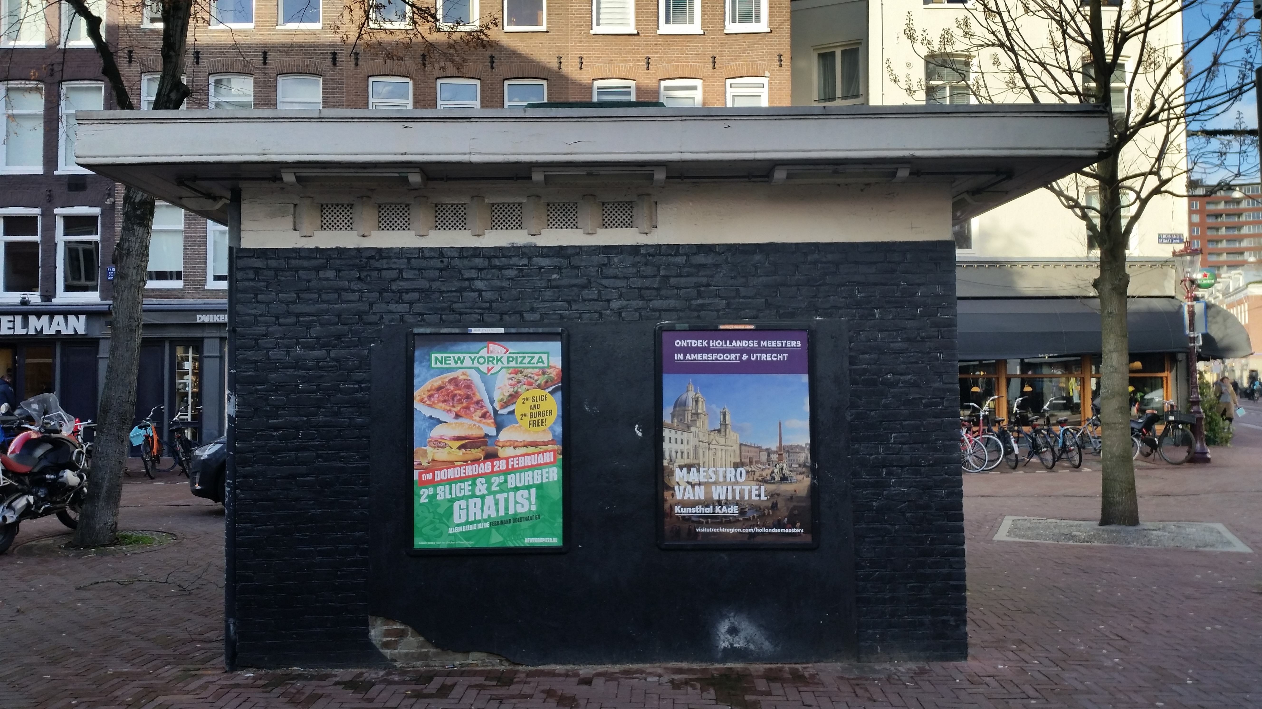 Transformatorhuisje aan de Ferdinand Bolstraat, Amsterdam; met reclameborden van New York Pizza en tentoostelling in Kunsthal Kade in Utrecht.